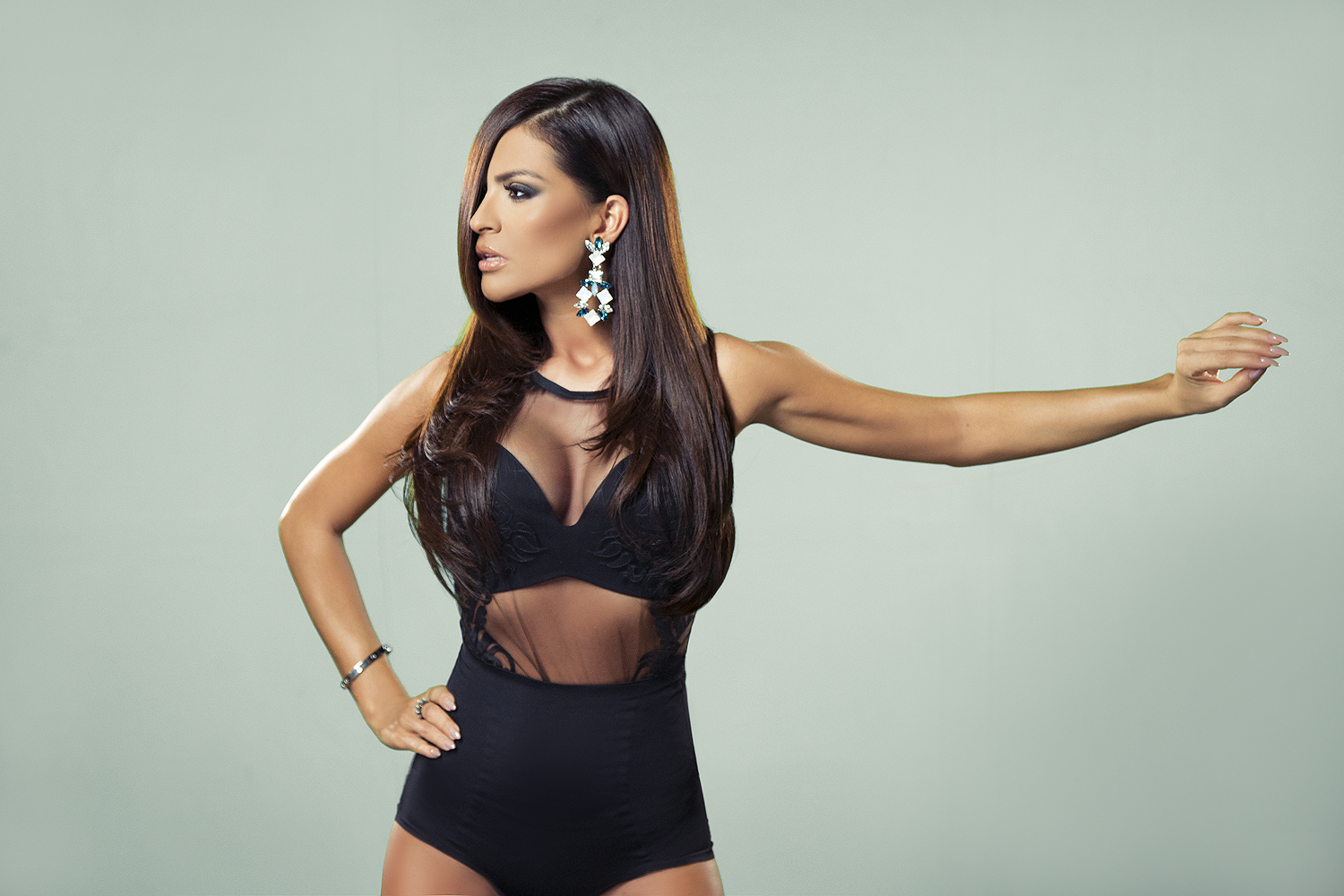 preslava